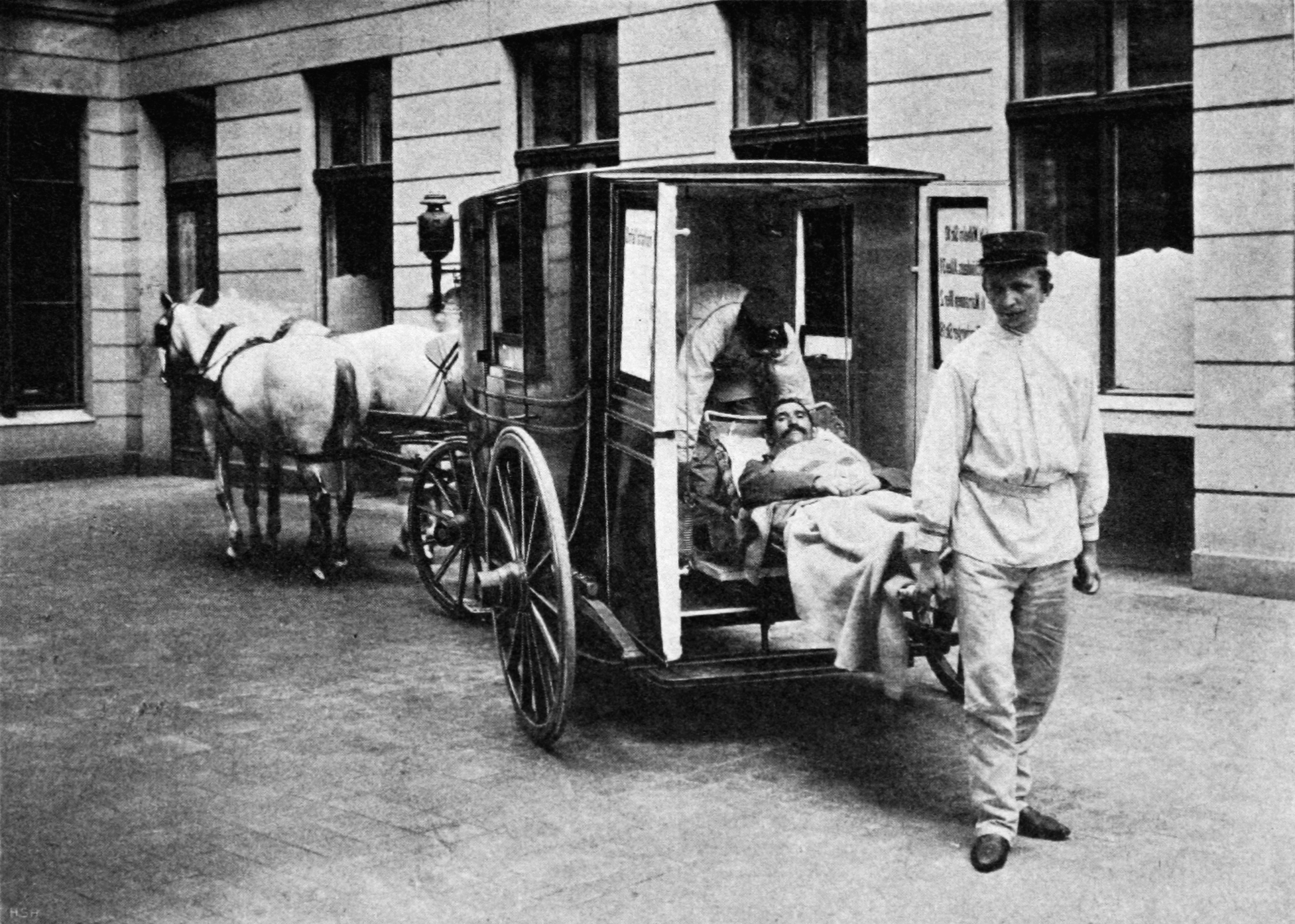 Pferdekrnkenwagen in Berlin.